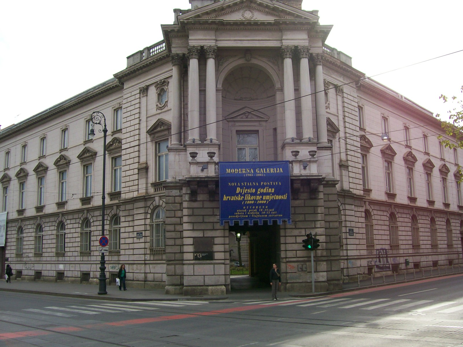 Moderna galerija, Zagreb